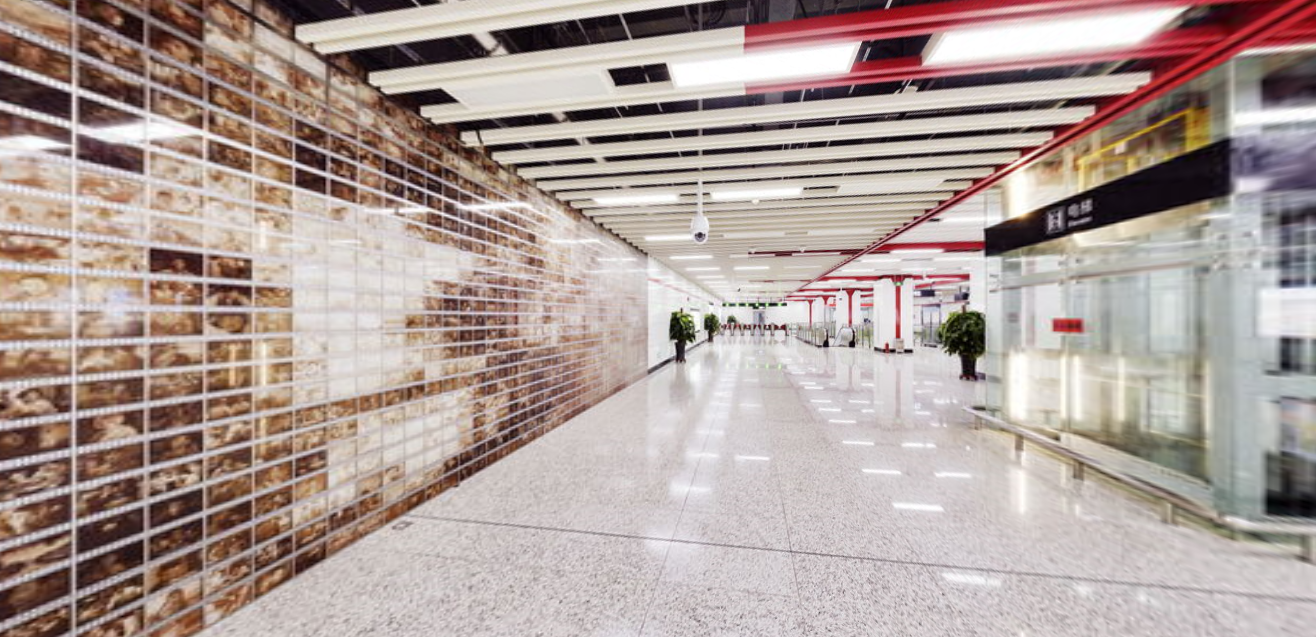 红嘴子站站厅